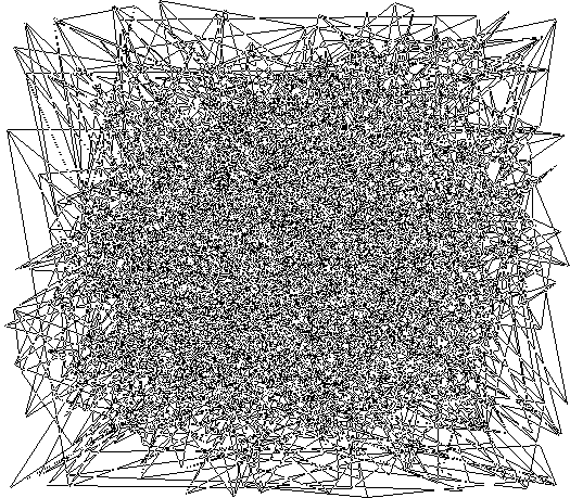 10 Trainingschritte.